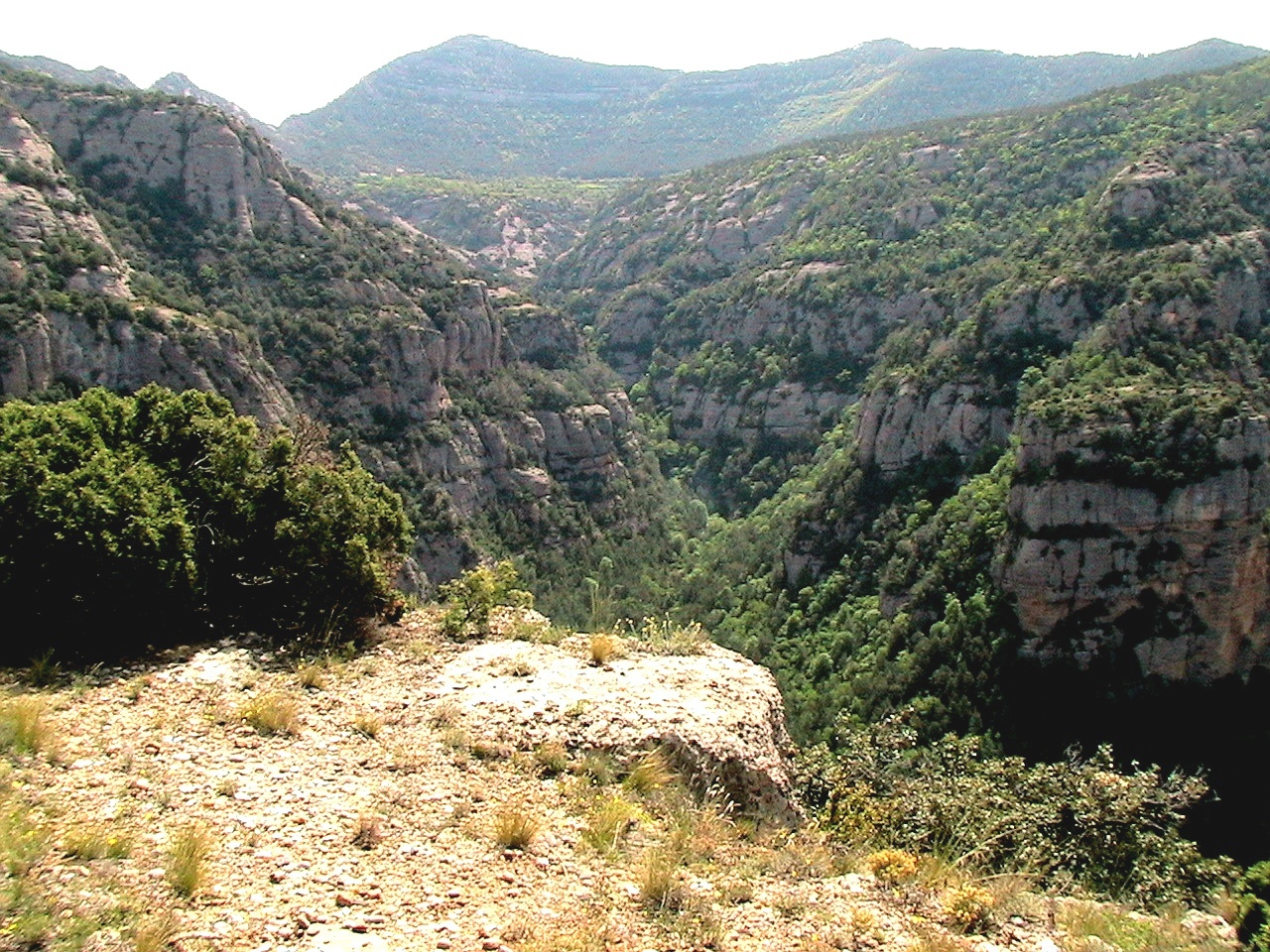 La rasa de les Fraus vista des de l'altra banda del riu Aigüa d'Ora, sota el Castellot d'Orriols. La Vall d'Ora (Navès - Catalunya)